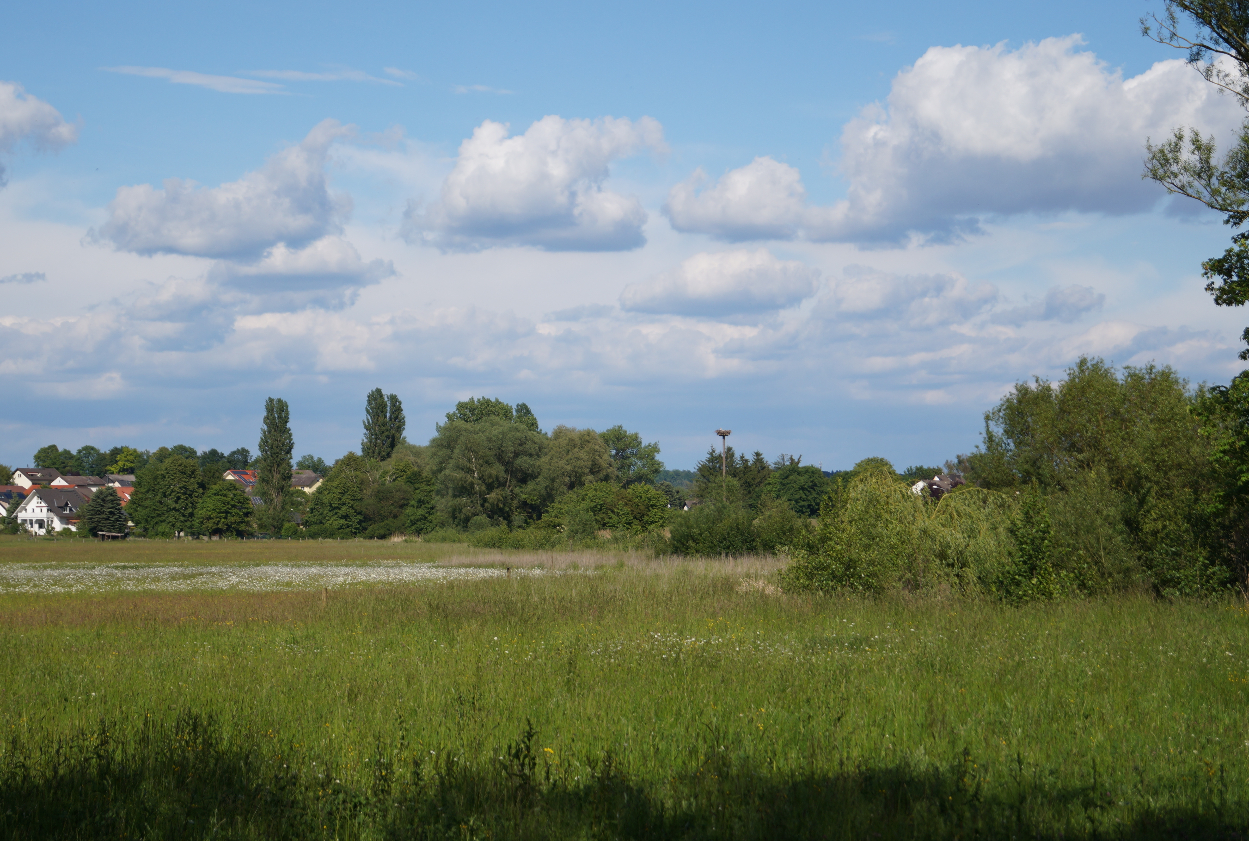 Naturschutzgebiet 1435027 Krebsbachaue zwischen Ober- und Niederissigheim. (Blick von Niederissigheim in Richtung Osten)